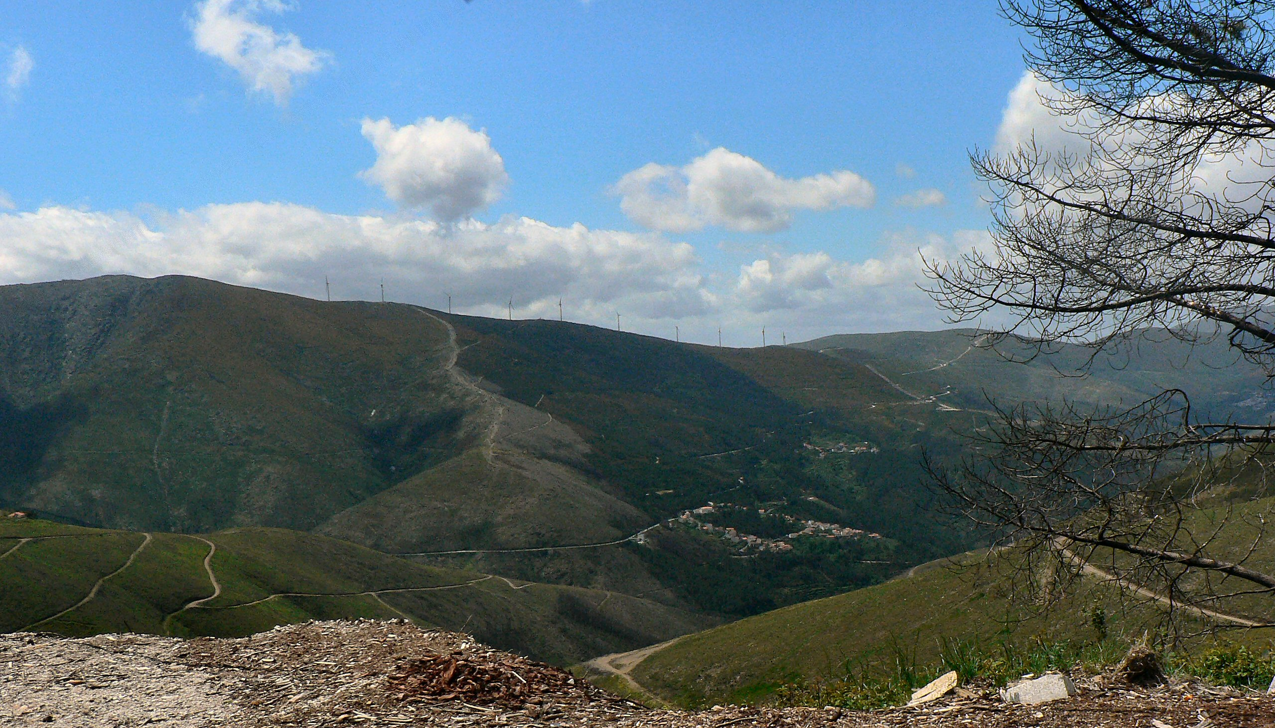 Vista da Serra da Estrela e Parque eólico